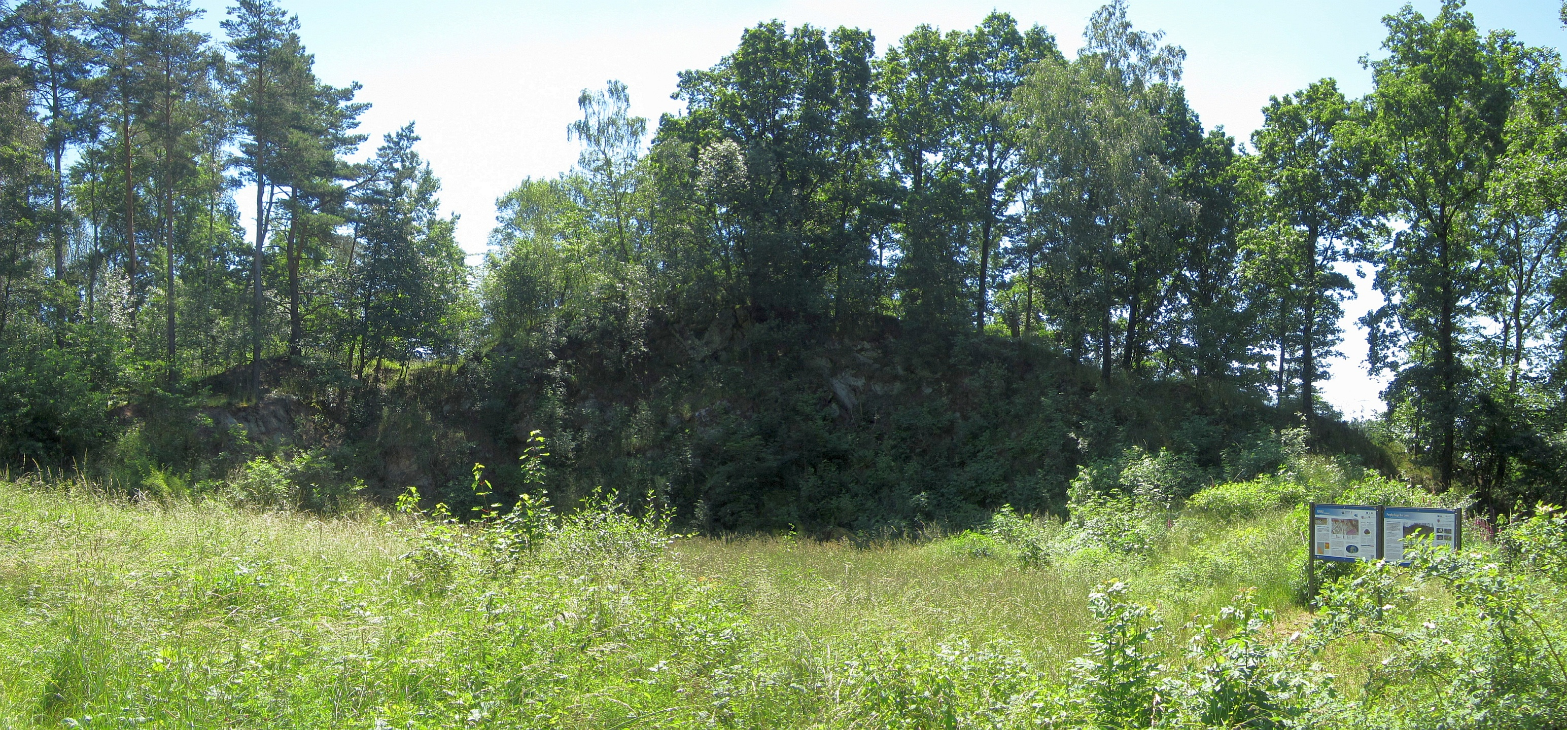 Quarzporphyrhügel bei Lenau (Kulmain), Geotop ID 377A002